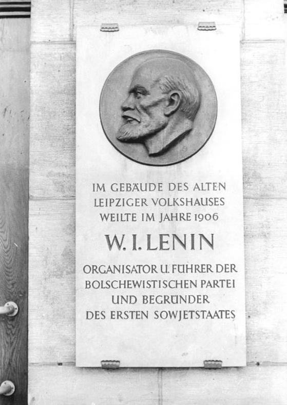 Leipzig, Lenin-Gedenktafel Zentralbild Bez. Red. Leipzig Ro-Ho. 8 Motive 24.10.1955 -Heinz Müller- Lenin-Gedenkstätten in der Messestadt Leipzig Die Gedenktafel am Ernst-Thälmann-Haus in der Karl-Liebknecht-Strasse.